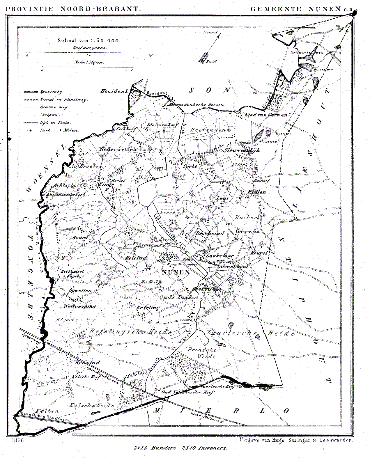 Nederland, Noord-Brabant, Gemeente Nuenen